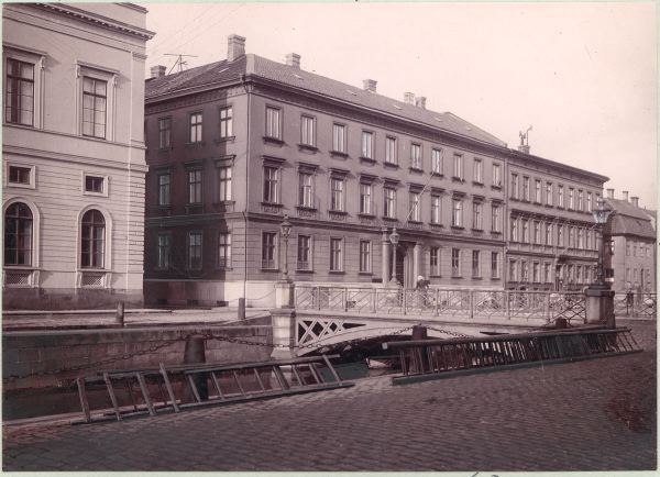 adress - avbildad Östra Hamngatan 17, 19 [fr.h.] byggnad - avbildad Kjellbergska huset; Hallska huset [fd] Bron är Postgatubron.